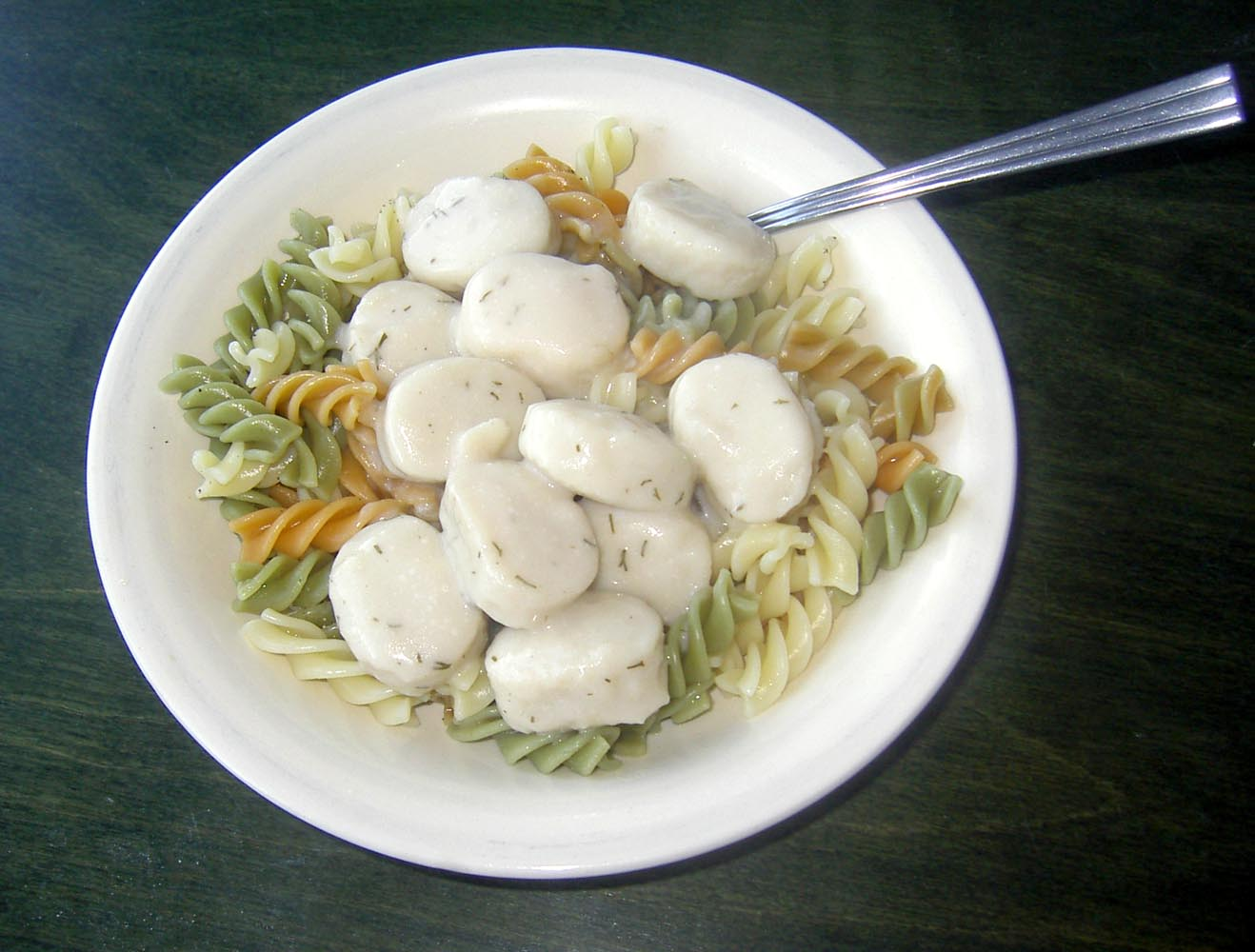 Fiskbullar